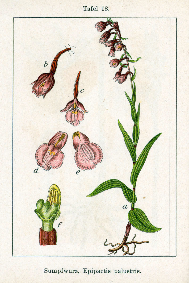 Gemeine Sumpfwurz, Epipactis palustris (L.) Crantz Original Description Sumpfwurz, Epipactis palustris